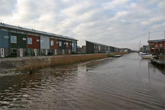 1e fase nieuwbouwwijk Drachtstervaart, Drachten.